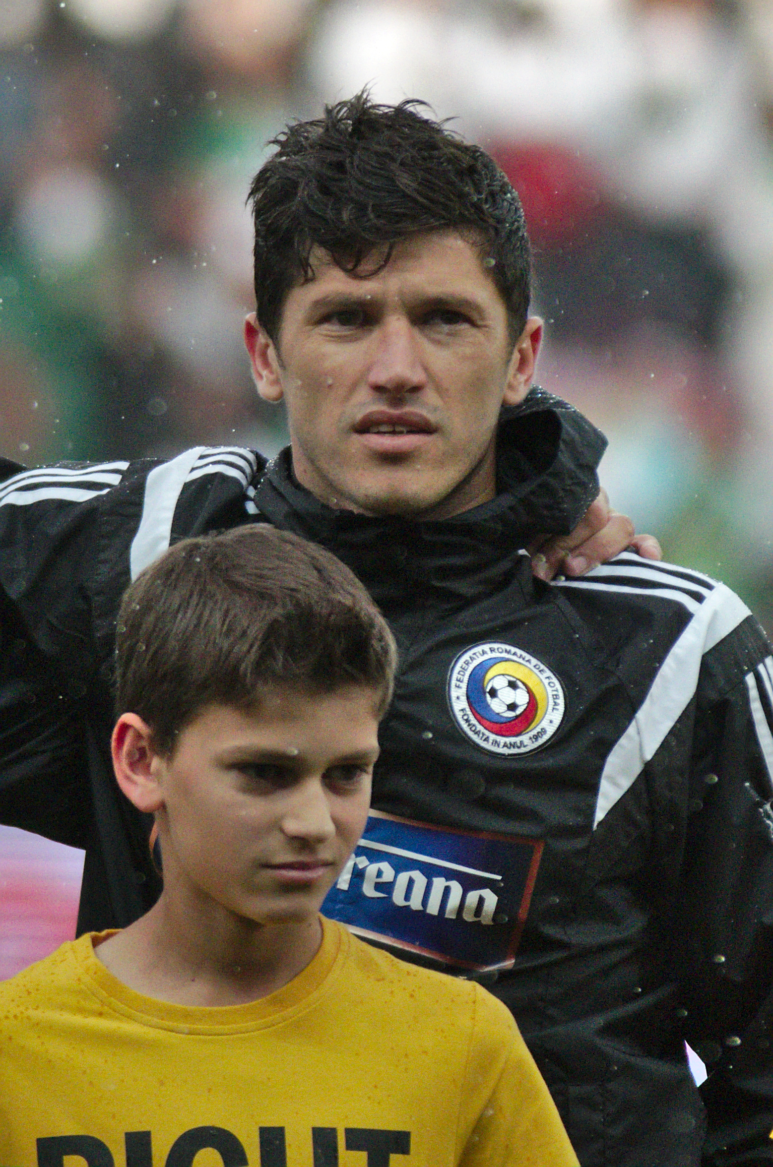 Algérie-Roumanie - 20140604 - Cristian Tănase